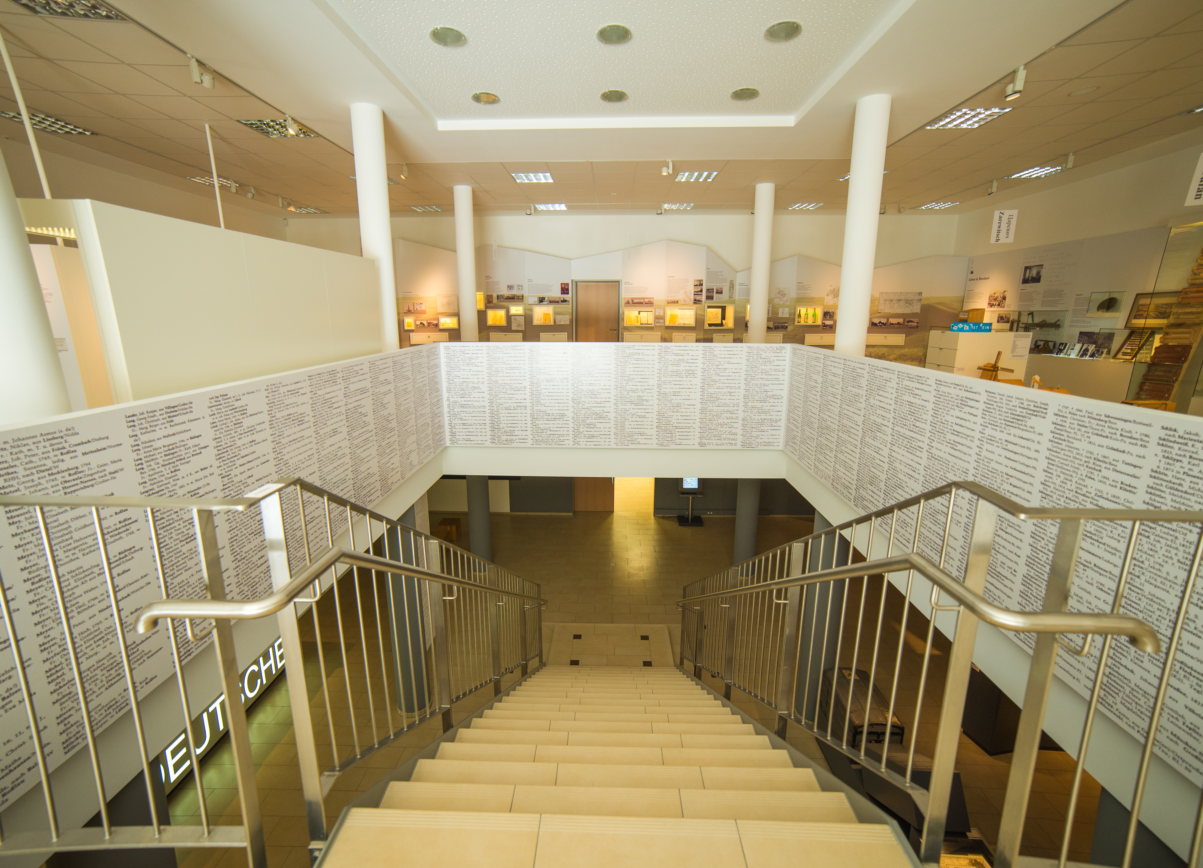 Dauerausstellung im Museum für russlanddeutsche Kulturgeschichte auf zwei Etagen.